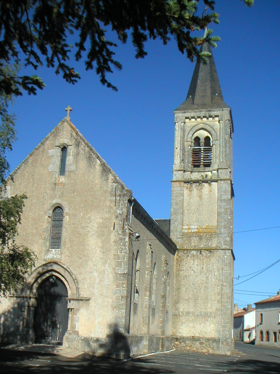 Eglise de la commune de La Chapelle Gaudin (79)